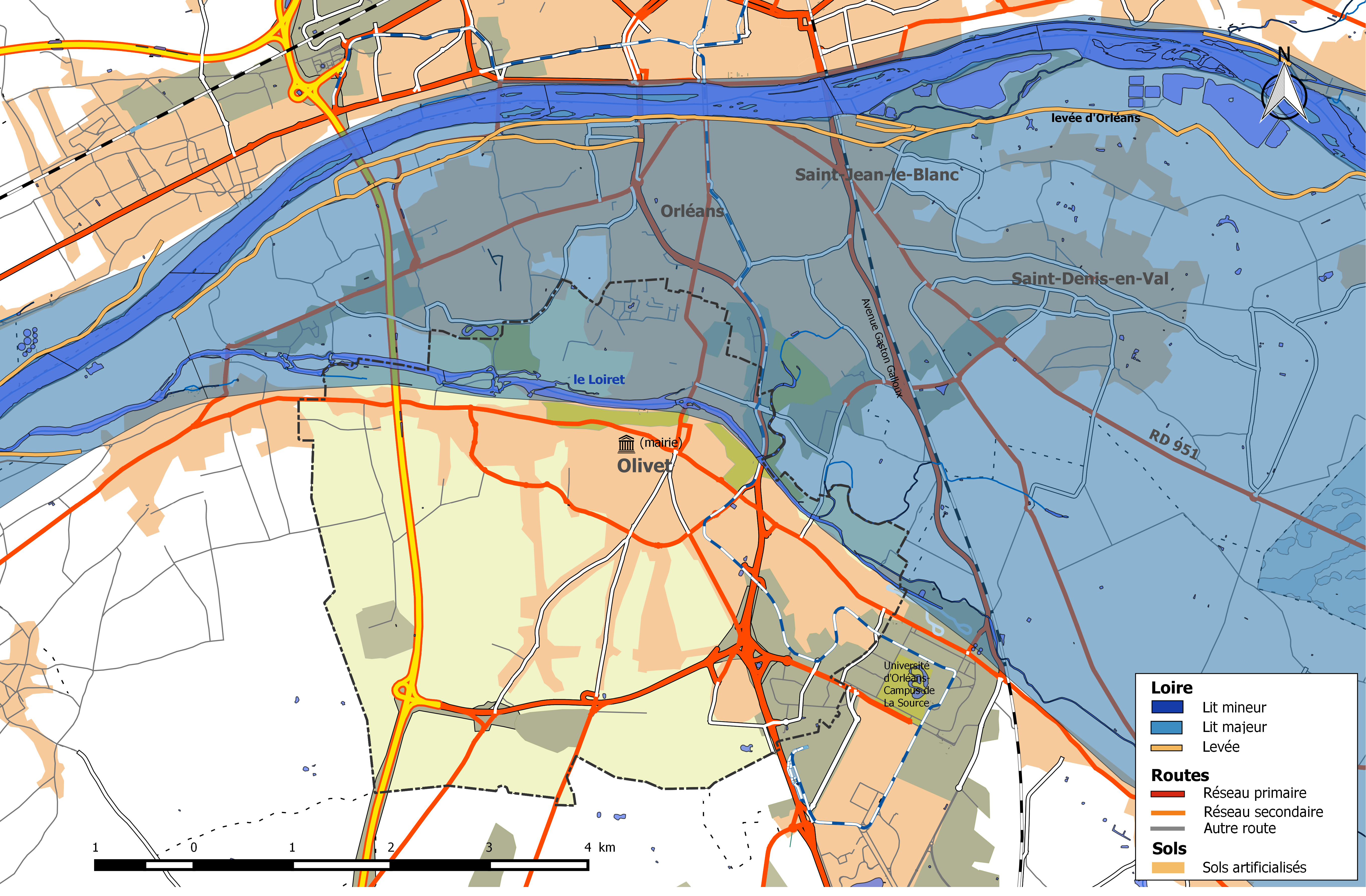 Zone inondable et réseaux hydrographique et routier de la commune d'Olivet.